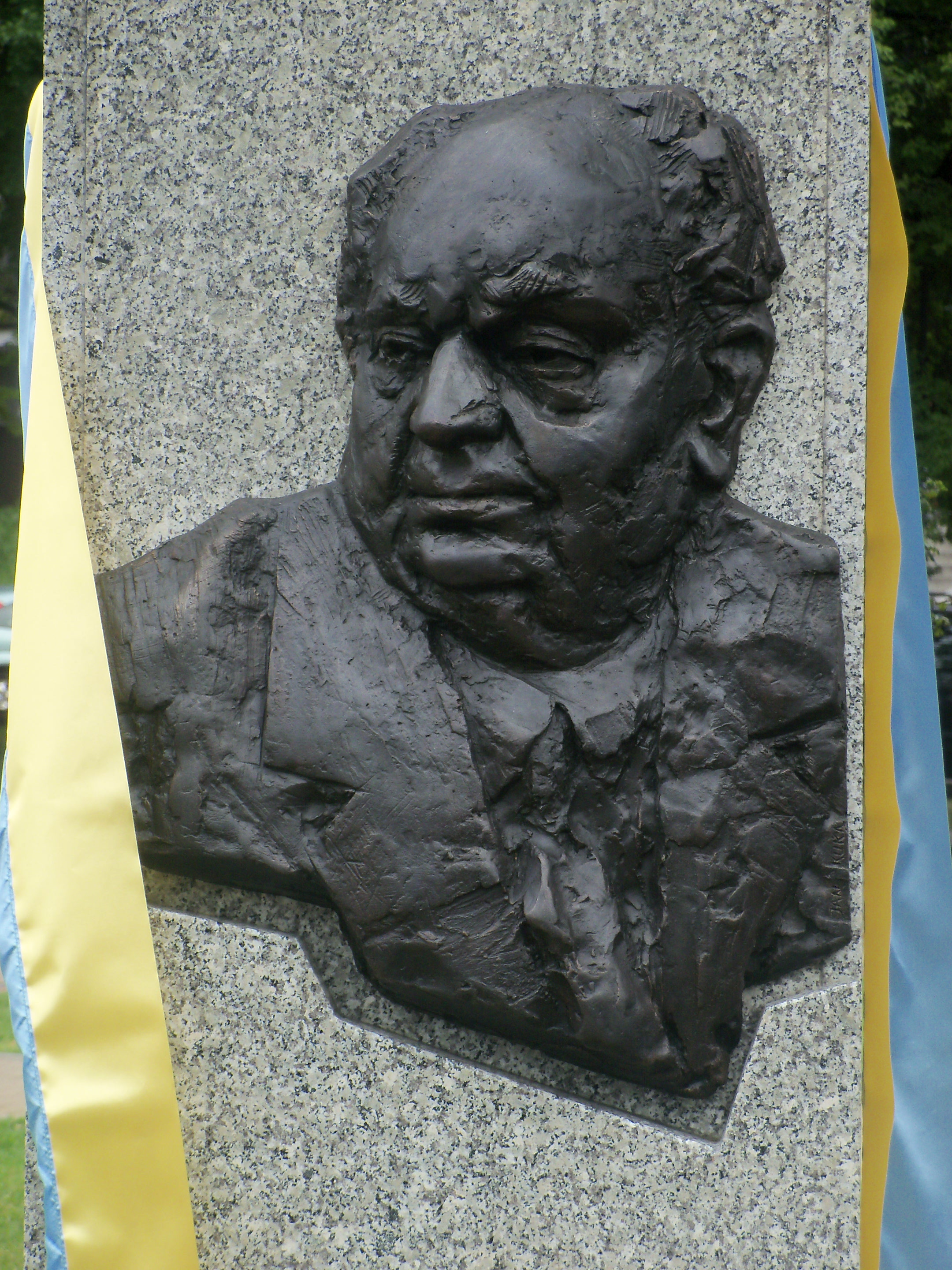 Tablica upam. Adolfa Dygacza na pl. Grunwaldzkim w Katowicach